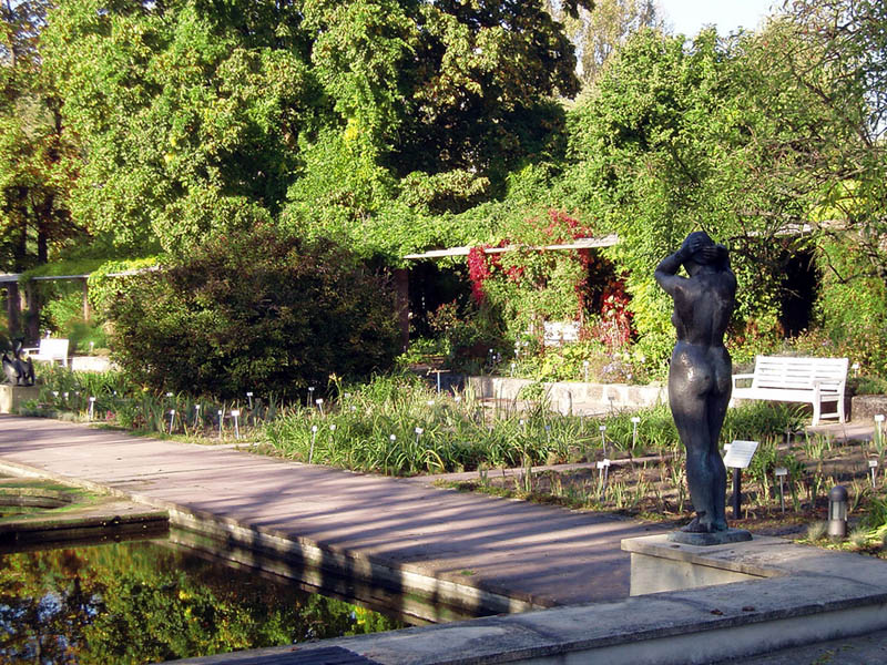 Freundschaftsinsel in Potsdam/Germany: sculpture Kämmende (1966) by G. Rommel